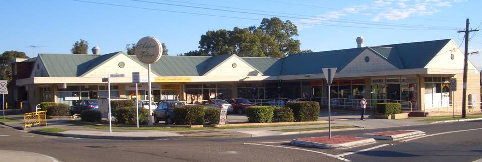 Milperra shops